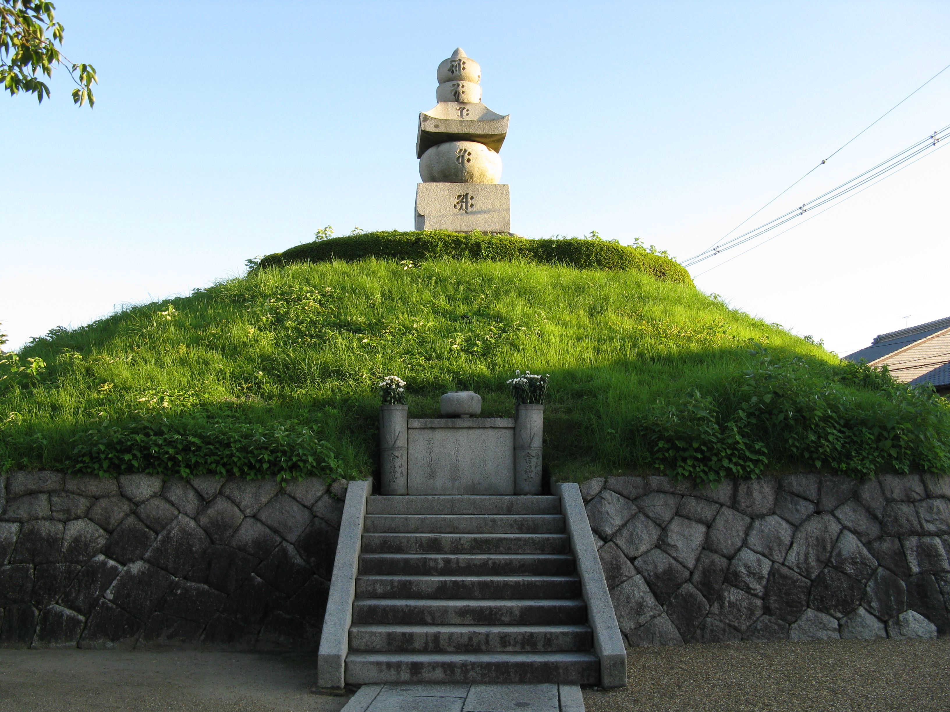 耳塚